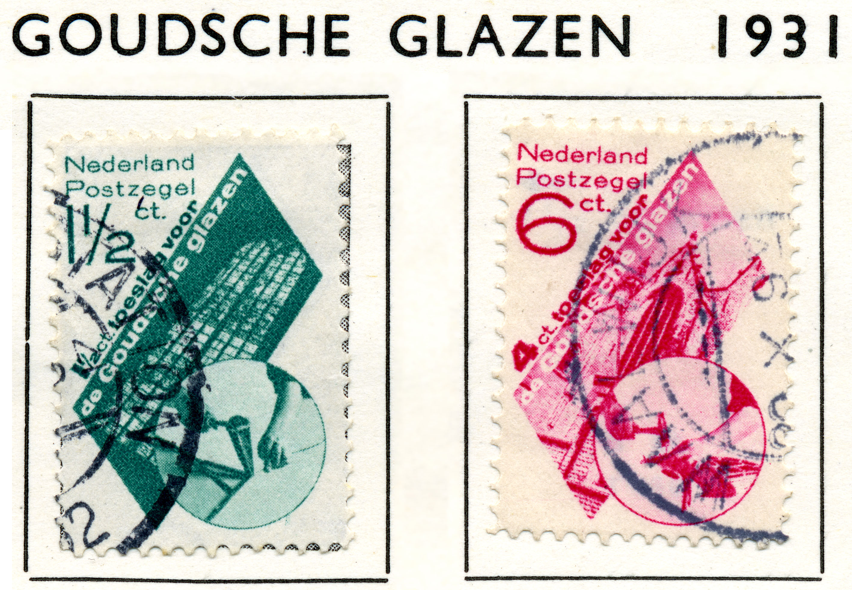 De Goudse Glazen Sint Janskerk te Gouda. In het medaillon glas-in-lood-bedrijf (1931). NVPH nr 238-239. Fotomontage door Piet Zwart.